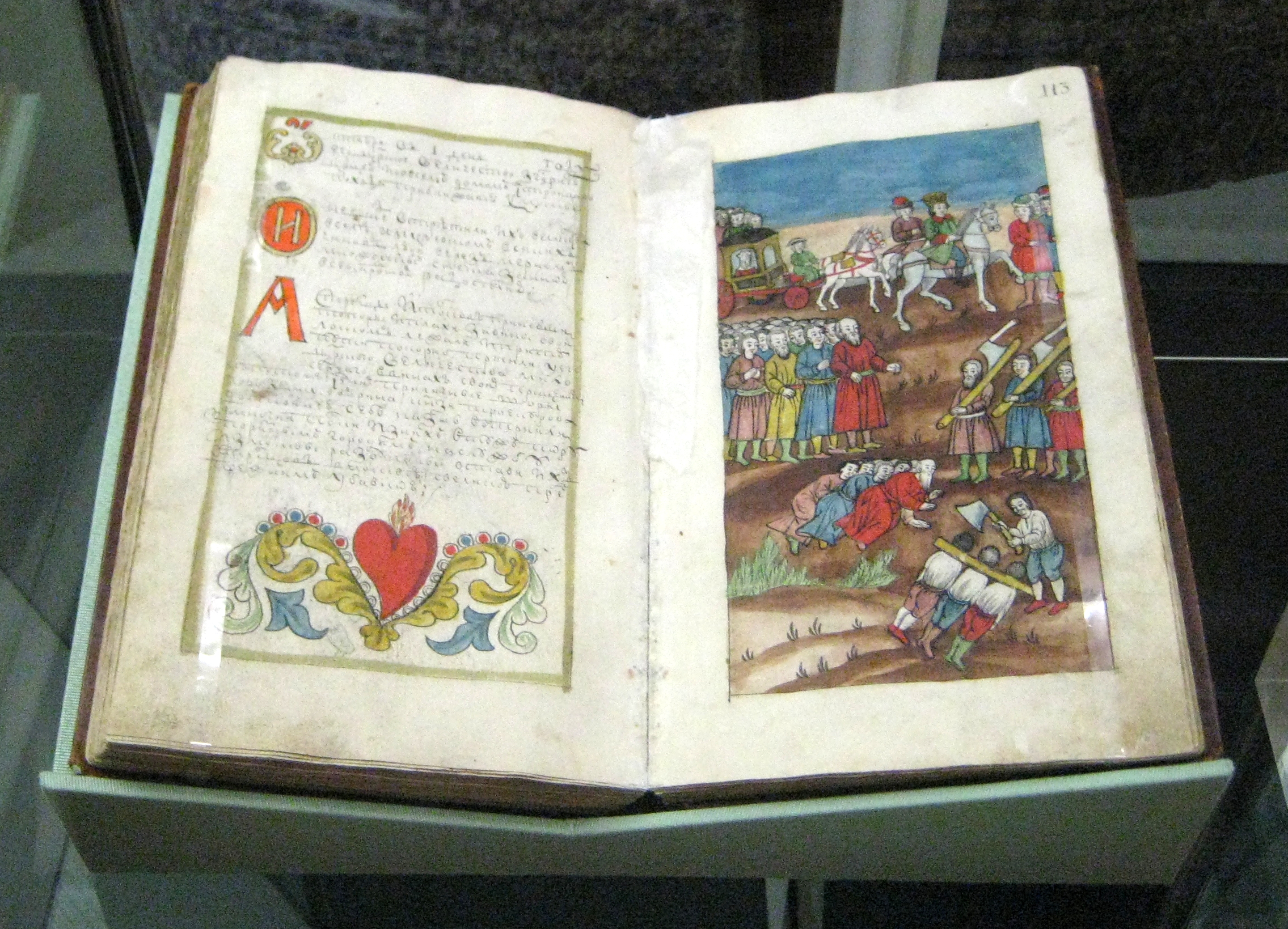 П.Н. Крекшин. История Петра Великого. Рукопись. Сер. 18 века. ГИМ